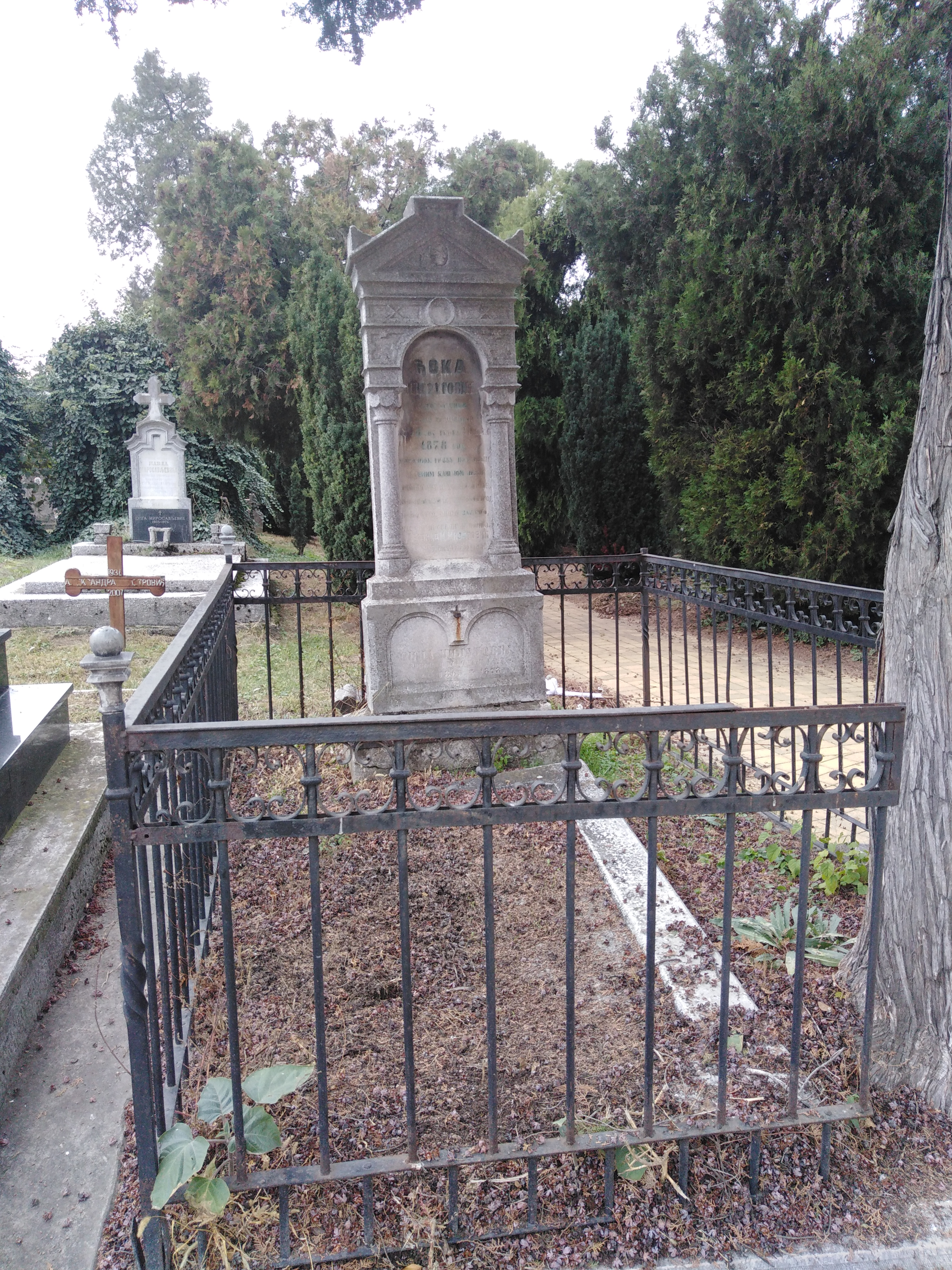 Гроб Ђорђа Мијатовића на Алманашком гробљу